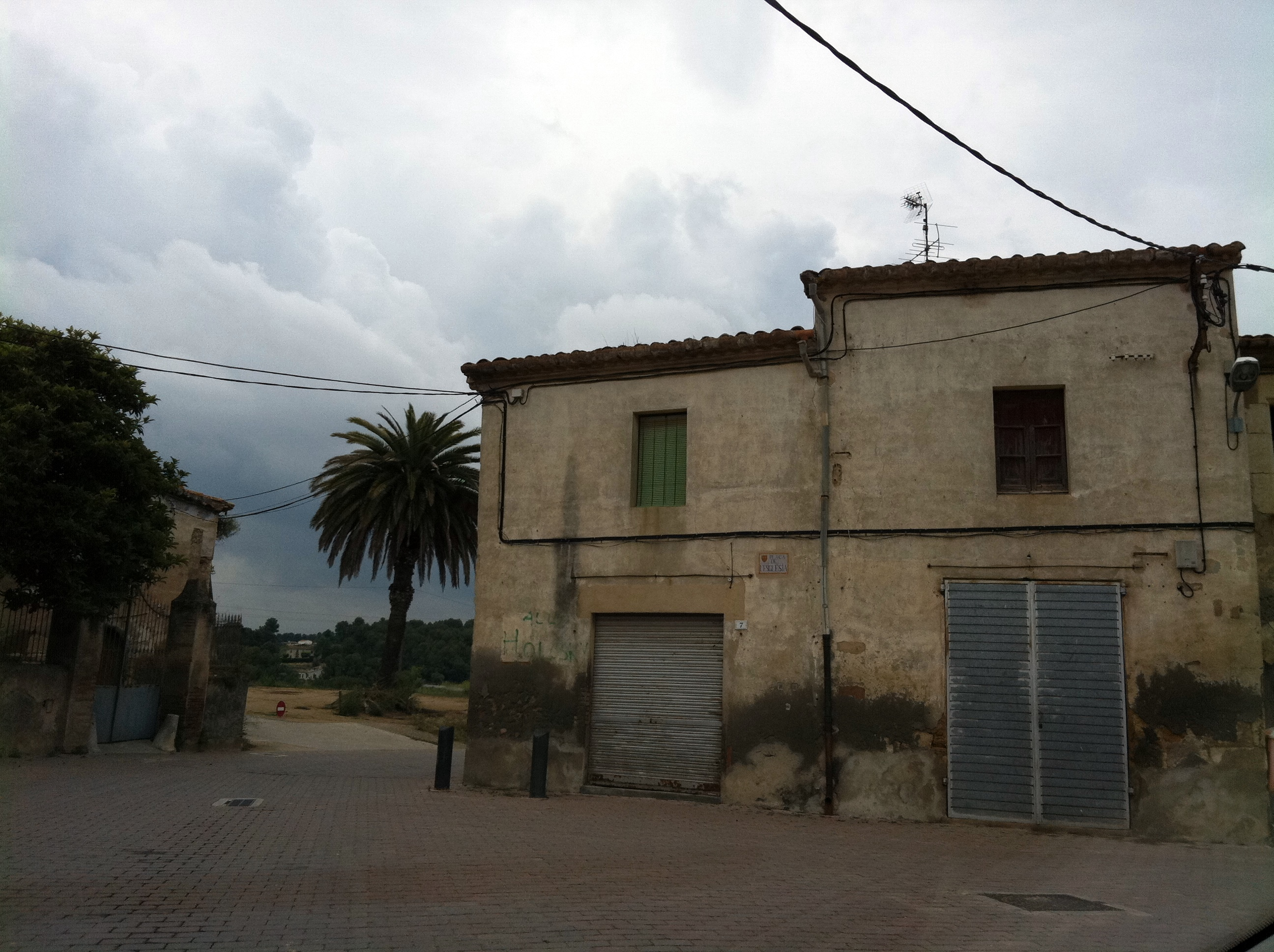 Sant Sebastià dels Gorgs